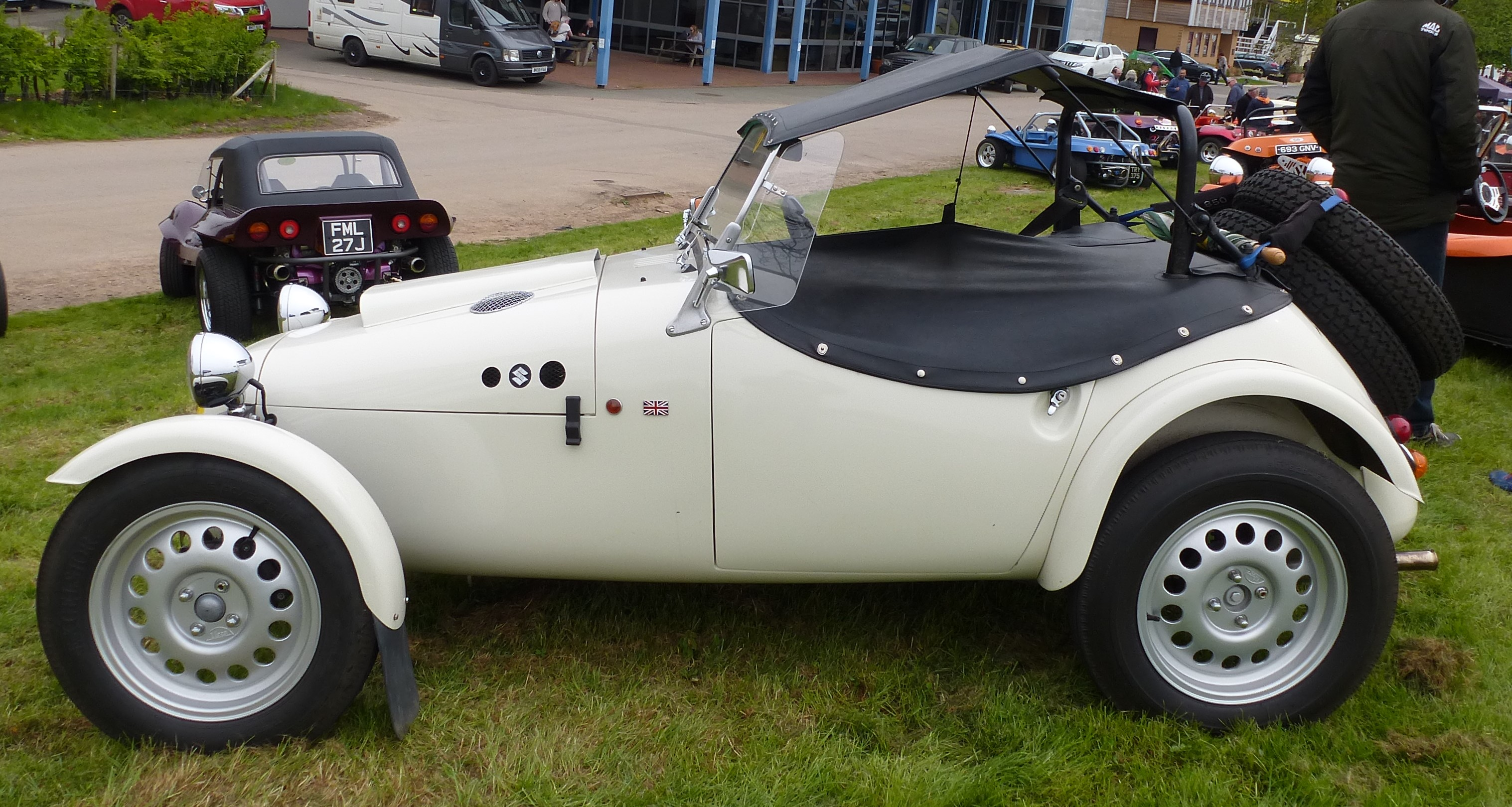 Liege SS